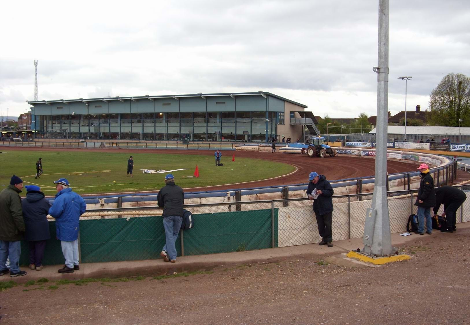 Poole stadium's west grandstand